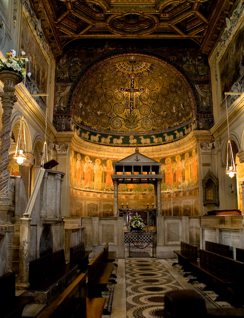 Basilica di S.Clemente